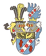 Wappen der Freiherren von Westenholz